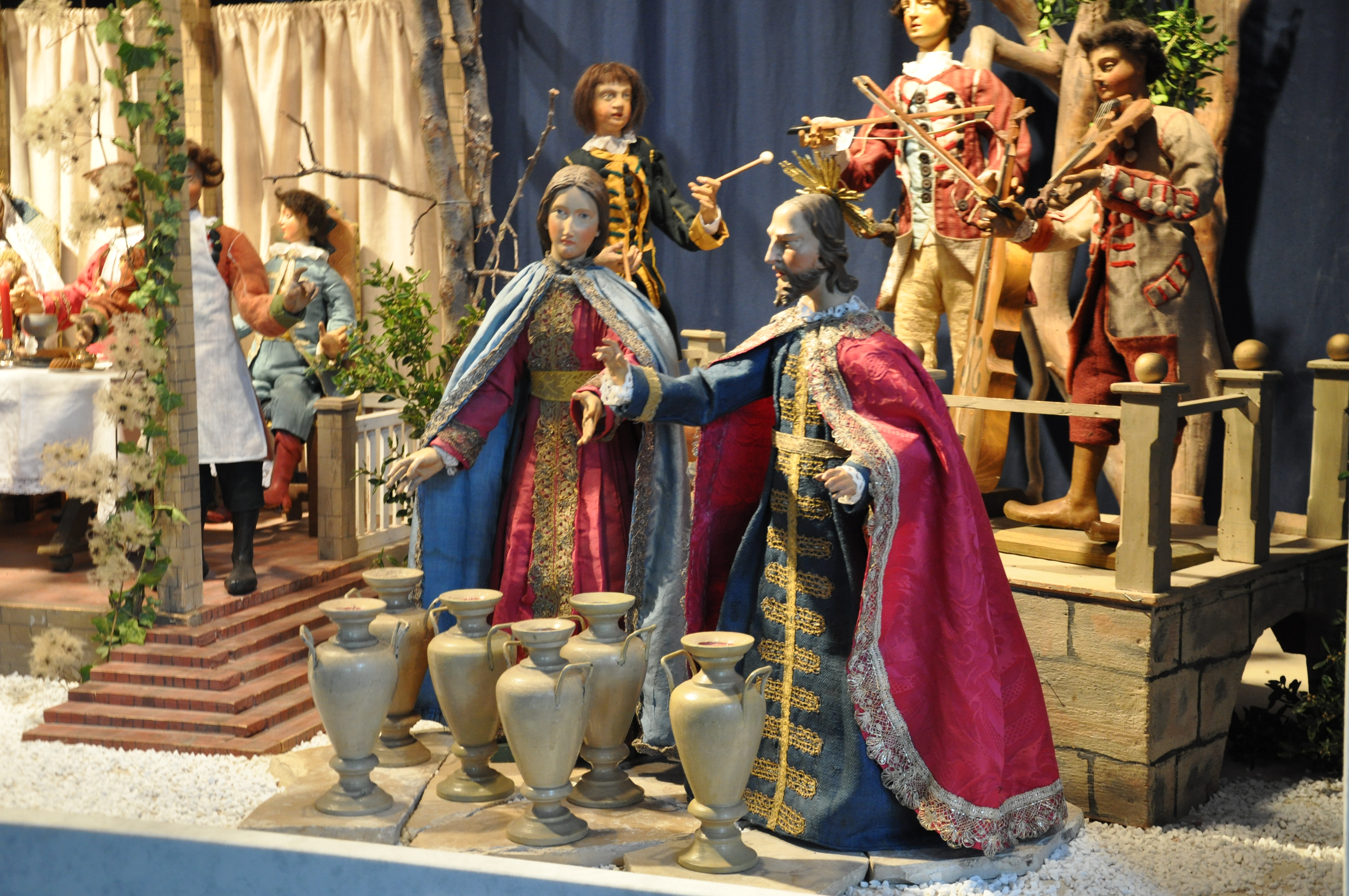 Gutenzell-Hürbel (Landkreis Biberach an der Riß), Ortsteil Gutenzell, Ehem. Klosterkirche Gutenzell, Barockkrippe, Szene: Hochzeit zu Kana